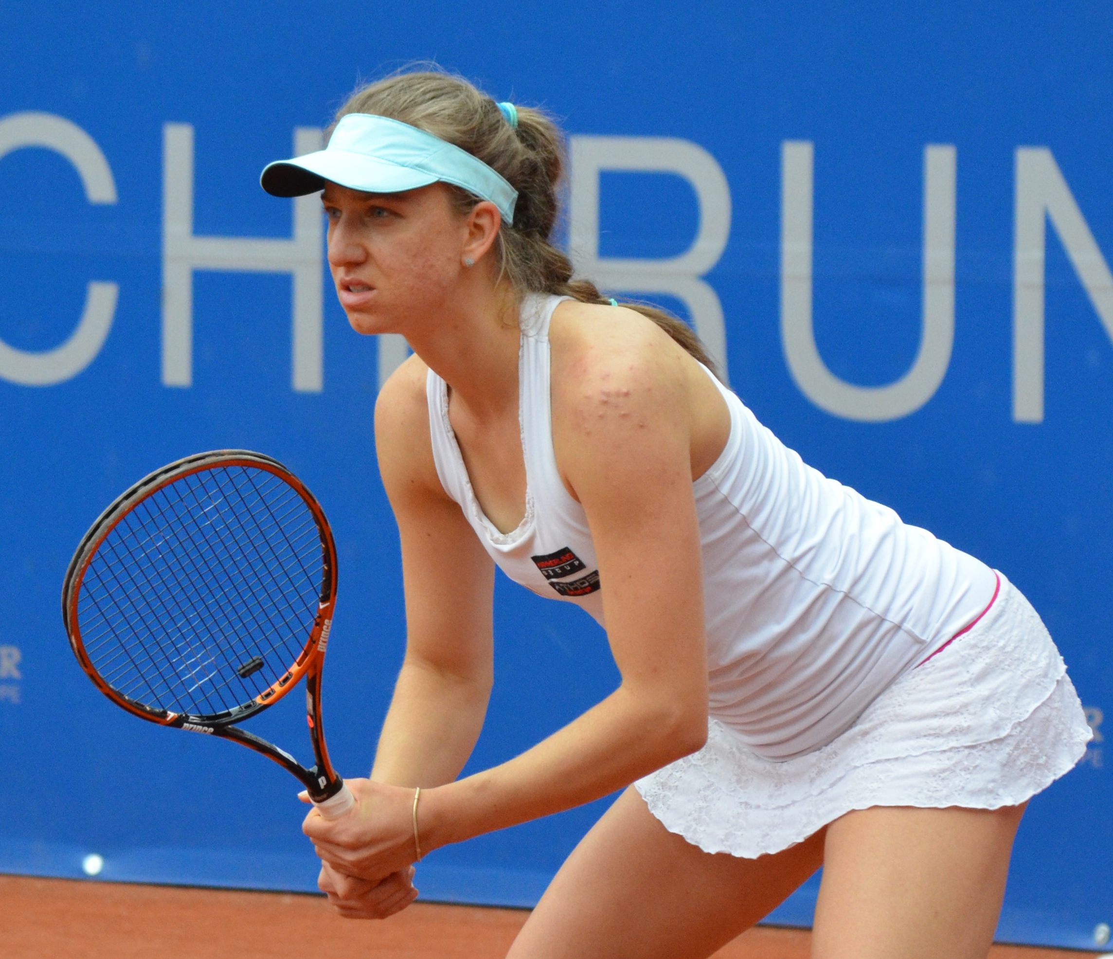 Mona Barthel in der Erstrundenbegegnung gegen Belinda Bencic beim Nürnberger Versicherungscup 2014